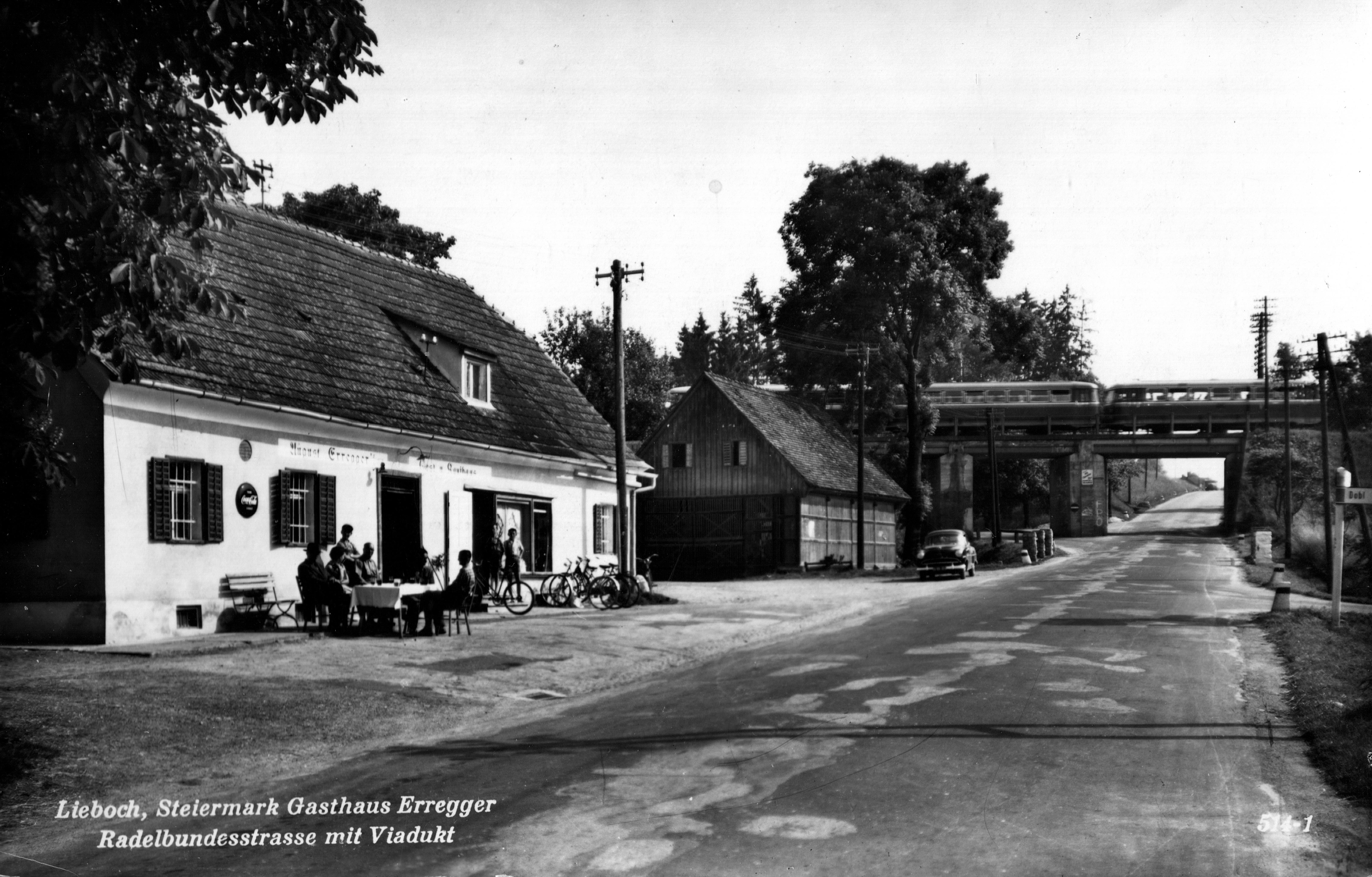 Gasthaus Erregger in Spatenhof, Lieboch (vermutlich in den 1950er Jahren). Im Hintergrund der "Rote Blitz" der GKB.